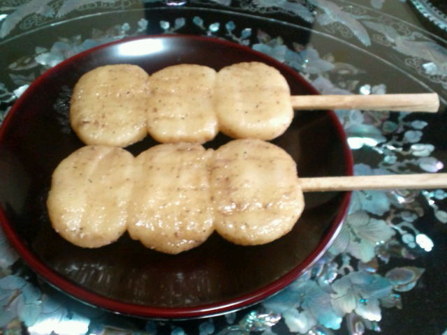 お茶餅の画像 2011年5月8日、岩手県盛岡市南大通1丁目の高橋だんご屋にて購入したお茶餅を撮影